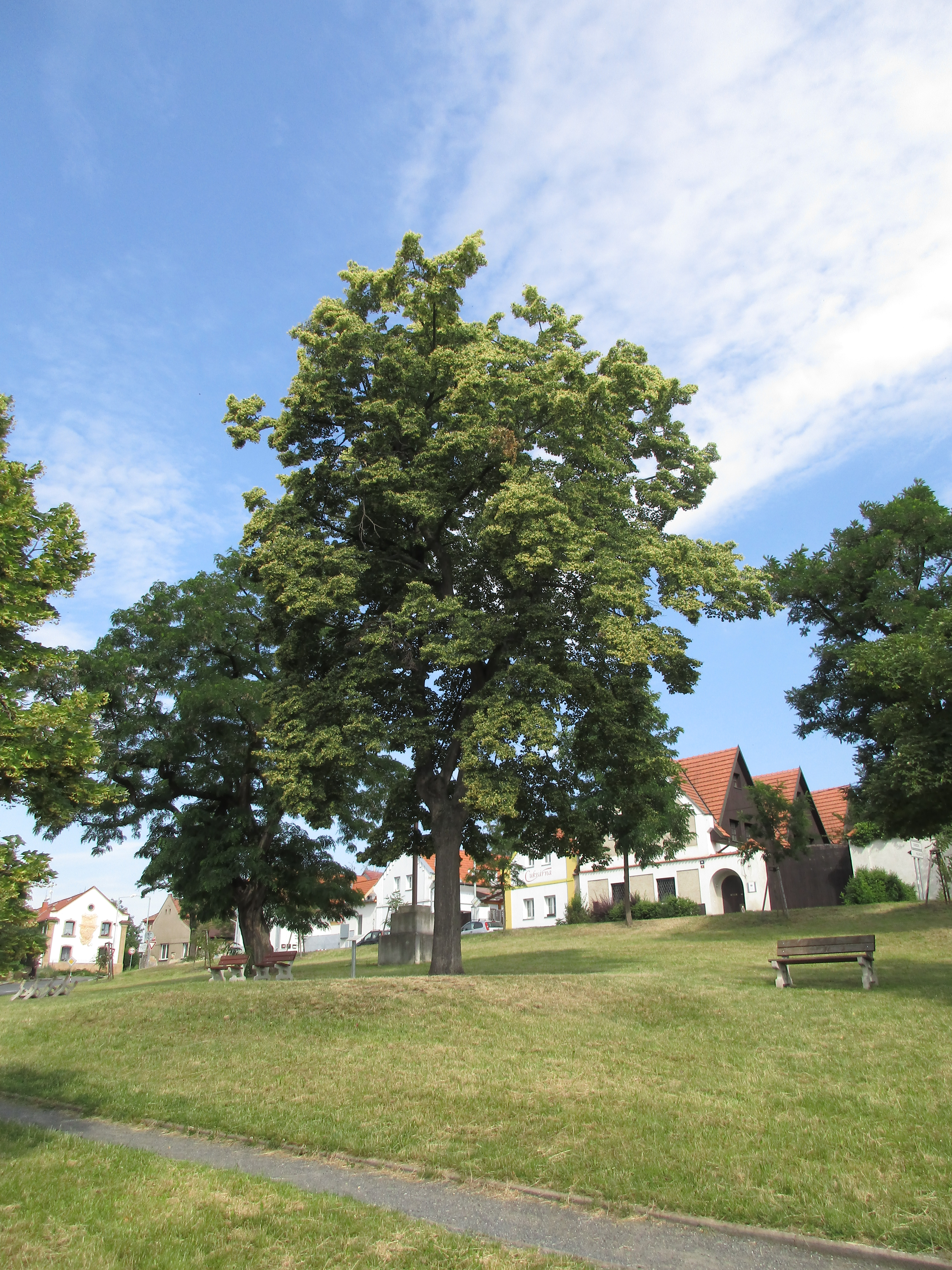 Lípa malolistá (Tilia cordata). Praha 10 - Dubeč, náměstí U Lípy svobody. Vysazena roku 1928 na památku vzniku Československé republiky. Významný strom, evidenční číslo MHMP: 2, v databázi od roku 2013.